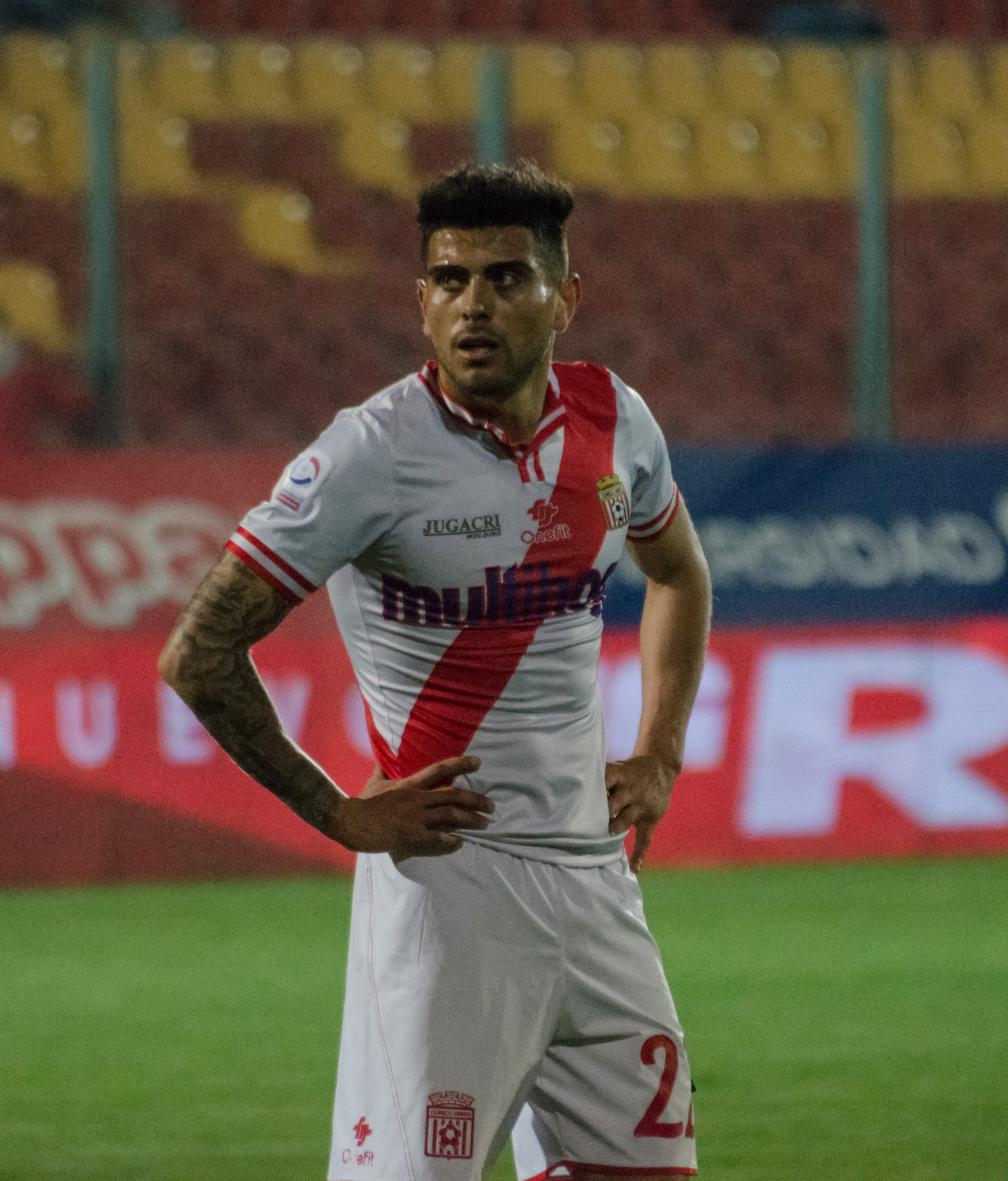 Christopher Díaz, Unión Española v Curicó Unido, Estadio Santa Laura, Independencia, Santiago, Chile